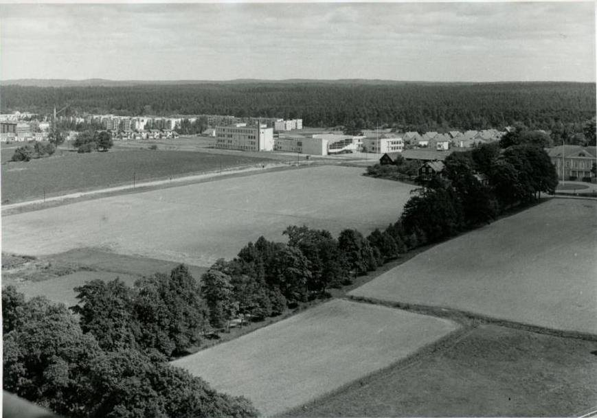 Foto av nybyggda Katedralskolan i mitten och Östrabo biskopsgård till höger. Till höger ligger nuvarande Östrabo koloniträdgård. Foto taget år 1959.